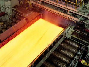 Stranggießen in der Hütten- und Walzwerktechnik